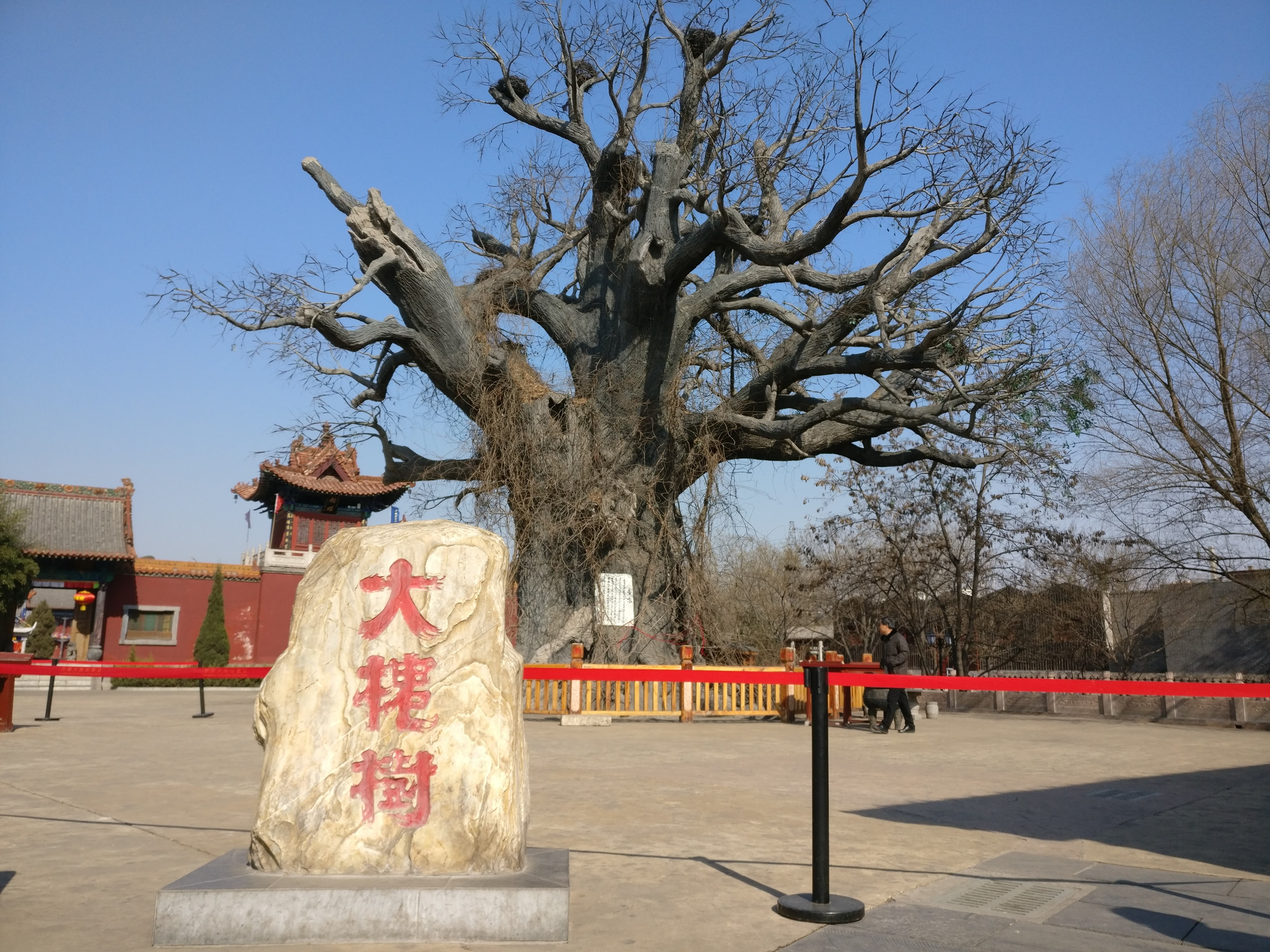 中文（中国大陆）: 洪洞大槐树根组纪念园